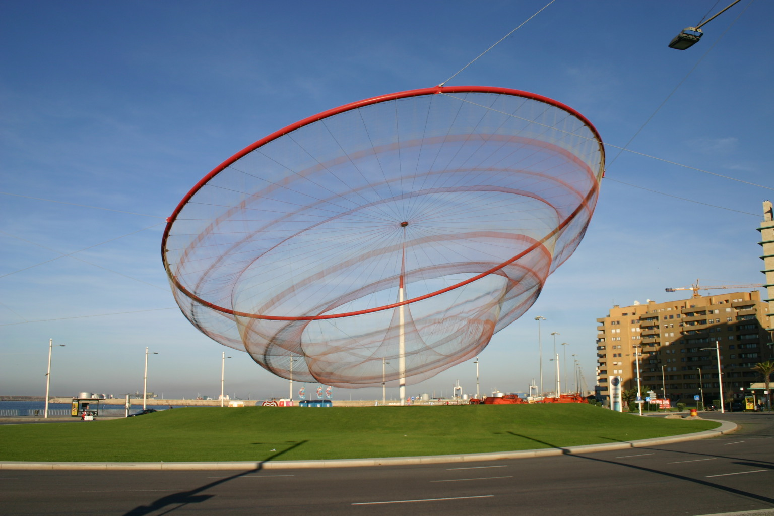 Praça da Cidade de Salvador, entre as cidades do Porto e Matosinhos.